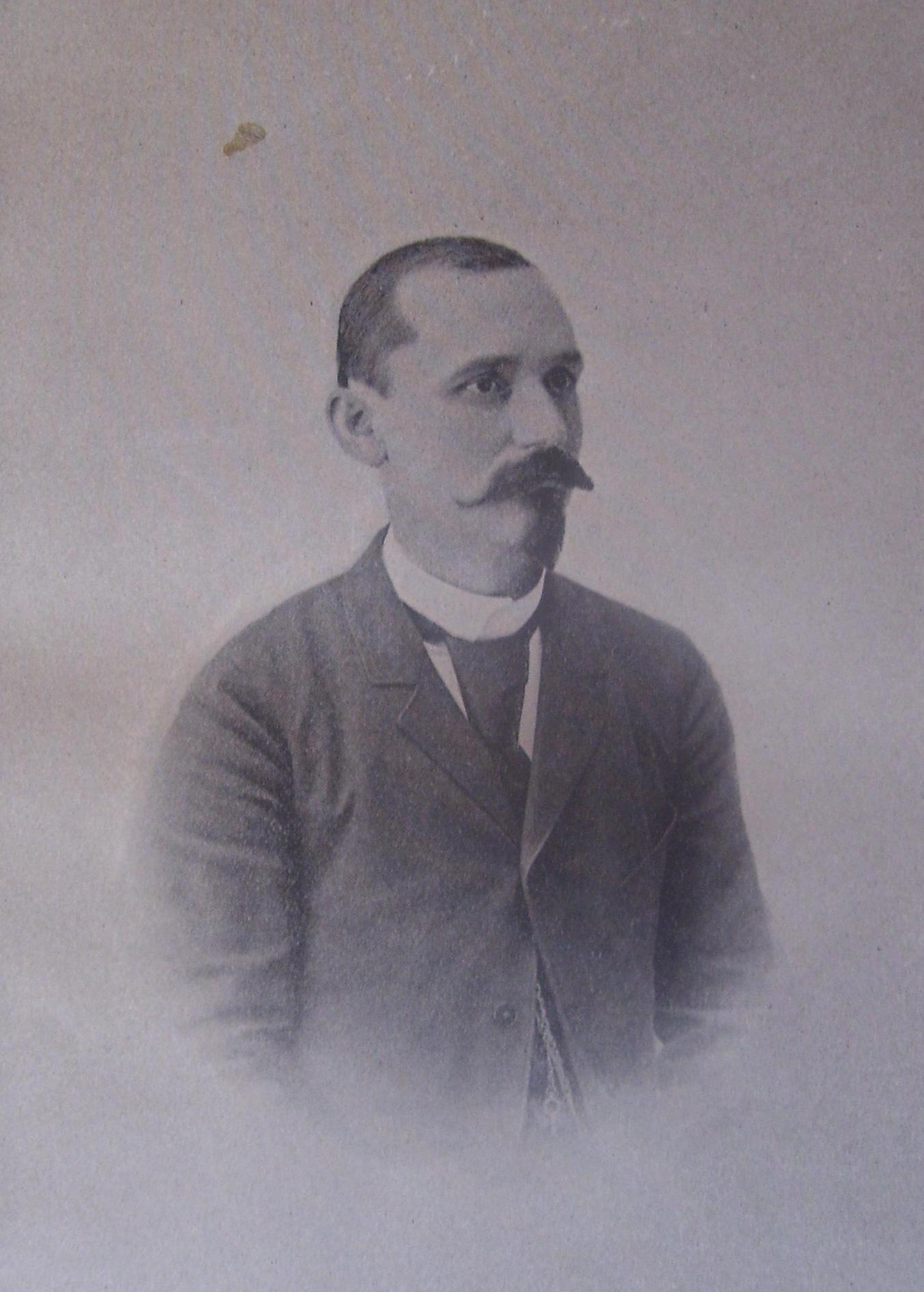 Трайко Китанчев (1858 - 1895)